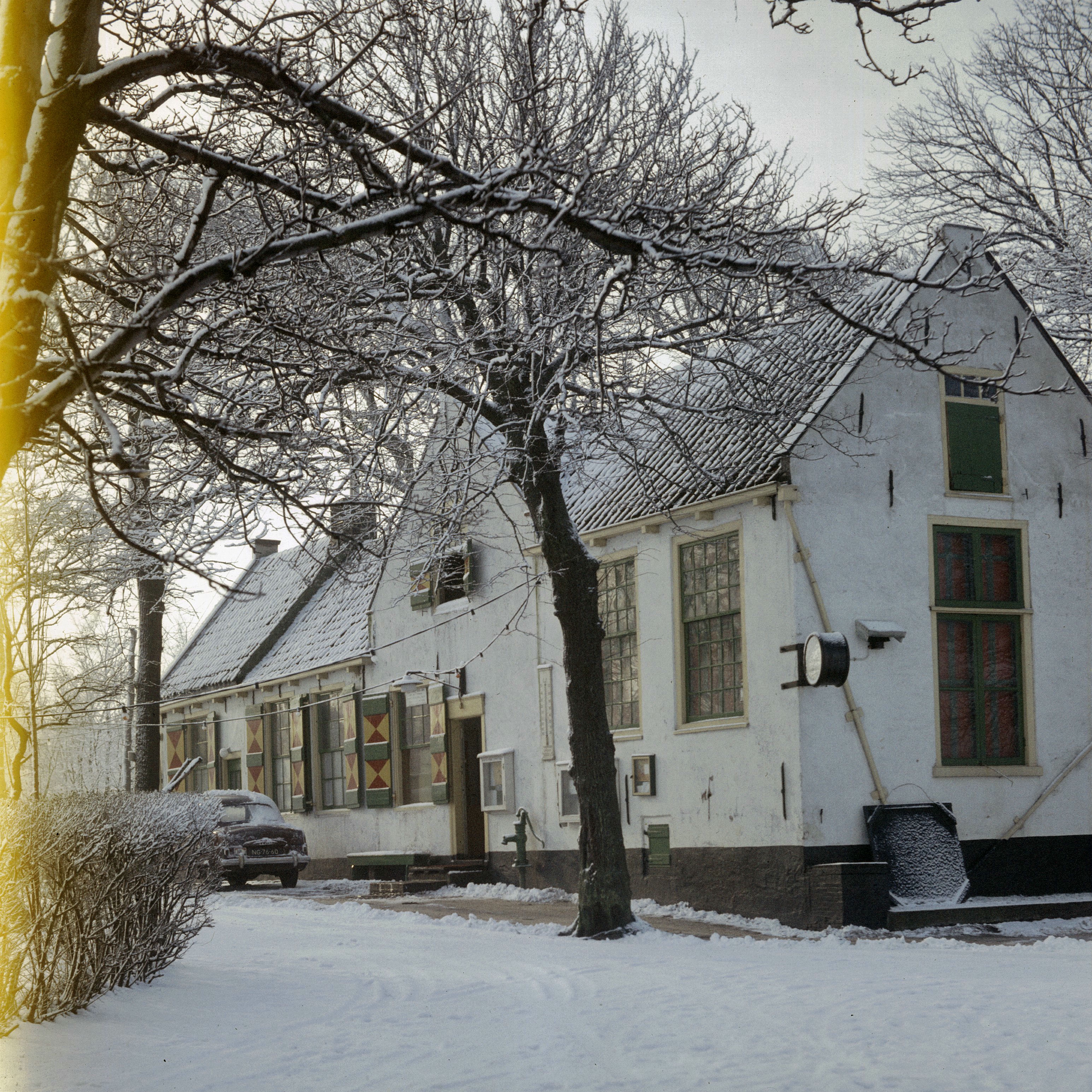 Boerderijen: Overzicht van de voorgevel en de rechter zijgevel van boerderij